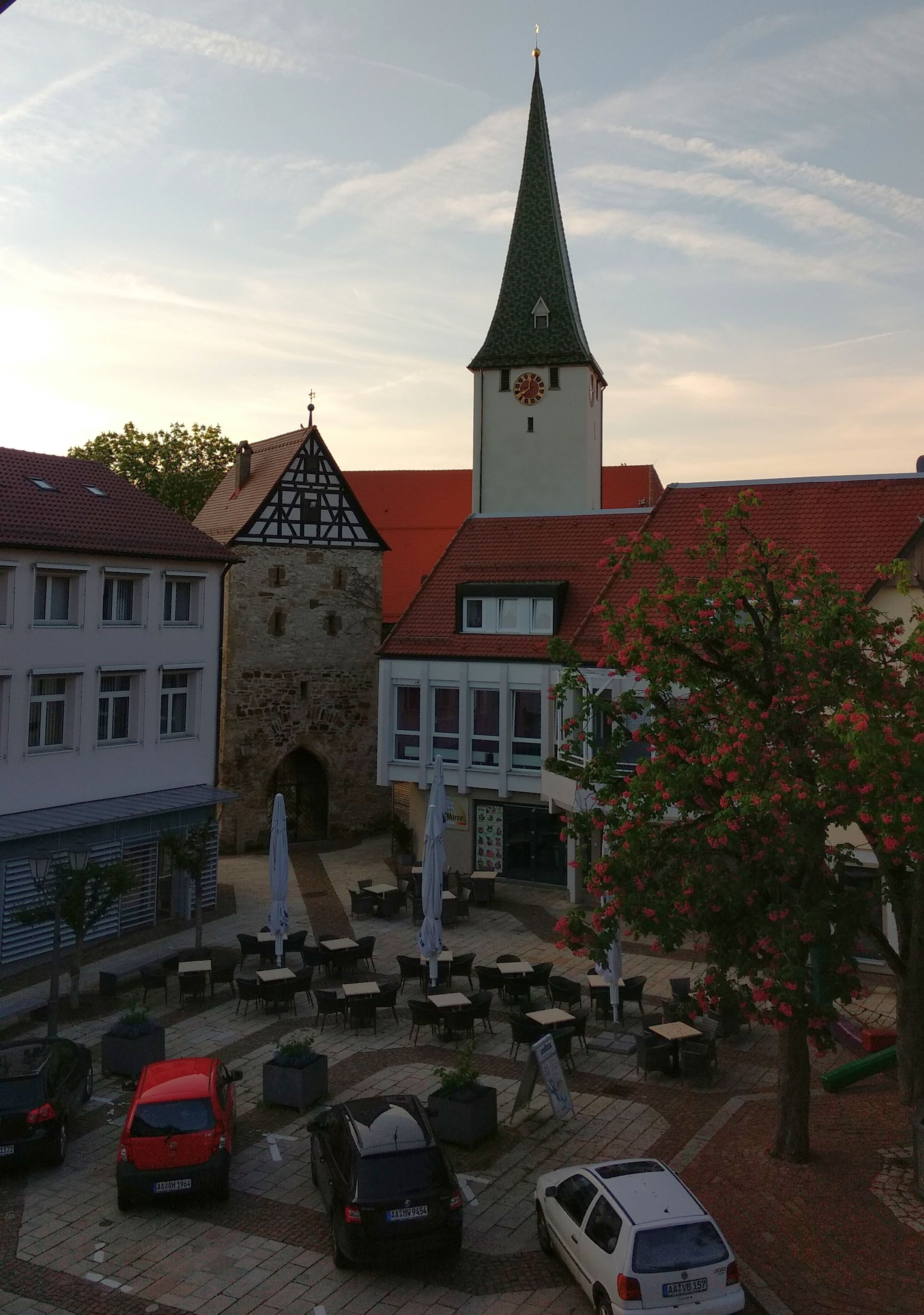 Heubach, Kirche St. Ulrich und Blockturm